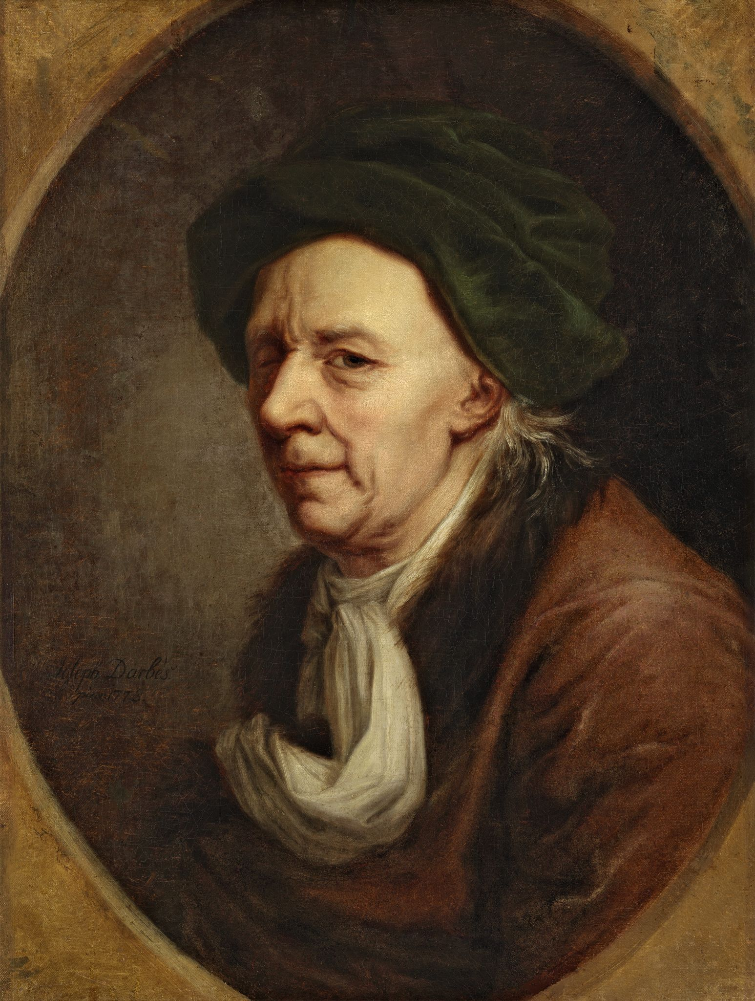 Эйлер Леонард Павлович